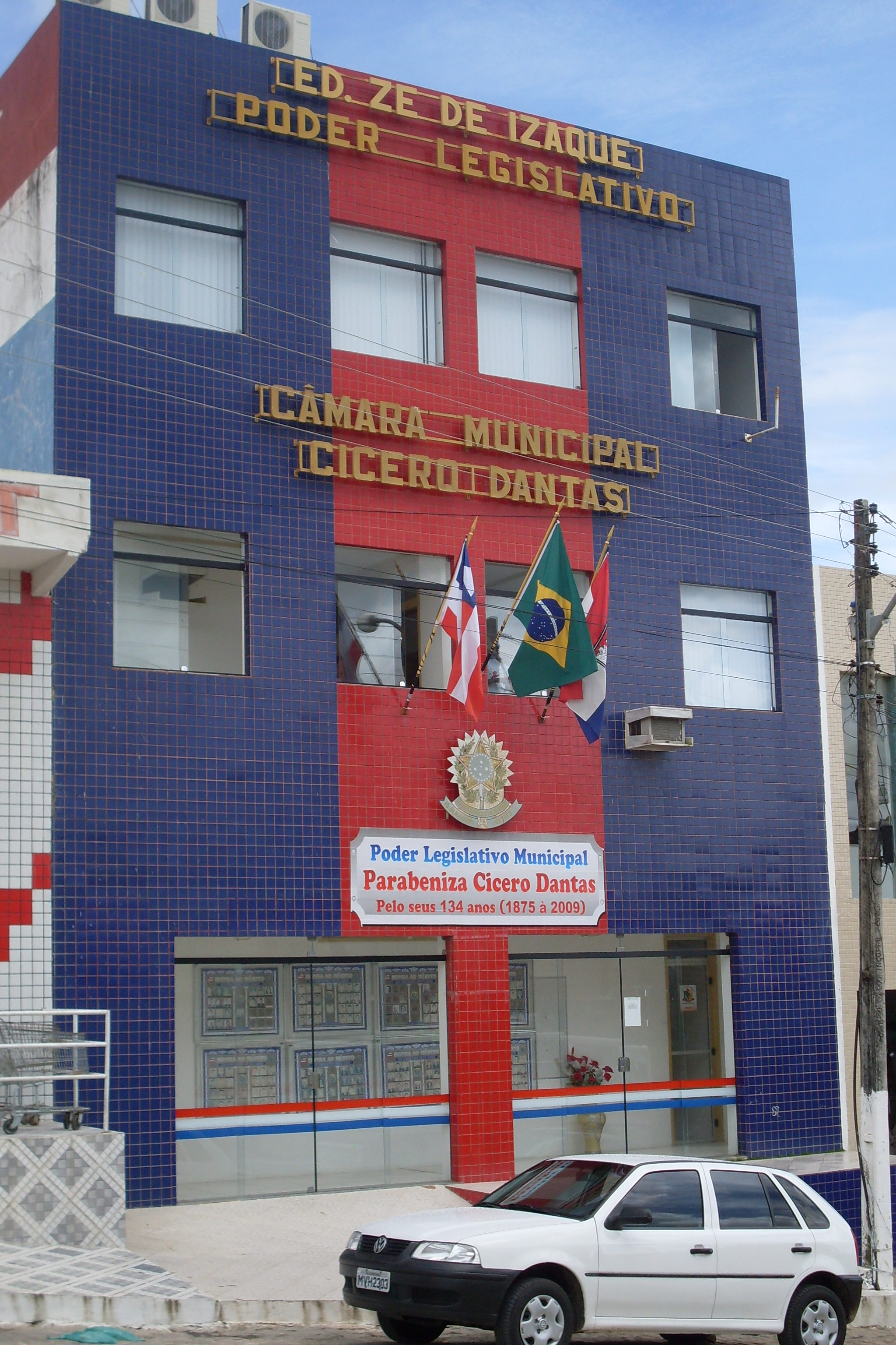 Edifício Zé de Izaque, Prédio da Câmara Municipal de Cícero Dantas - Ba